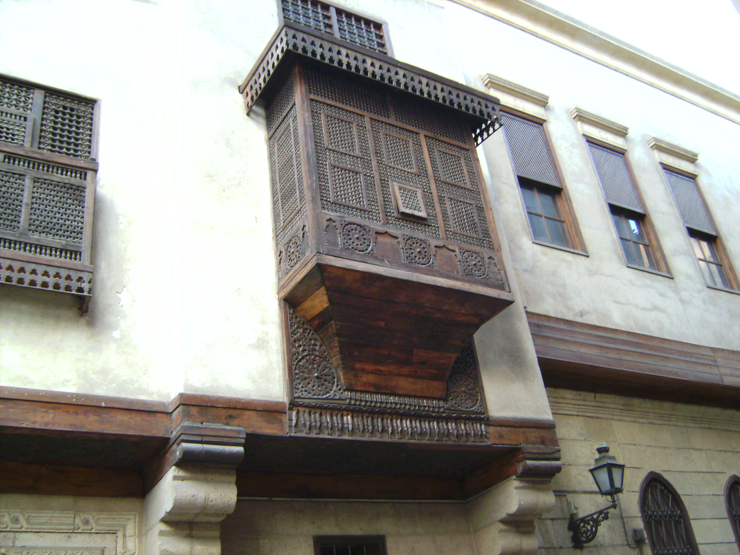 مشربية ببيت السحيمي بالقاهرة